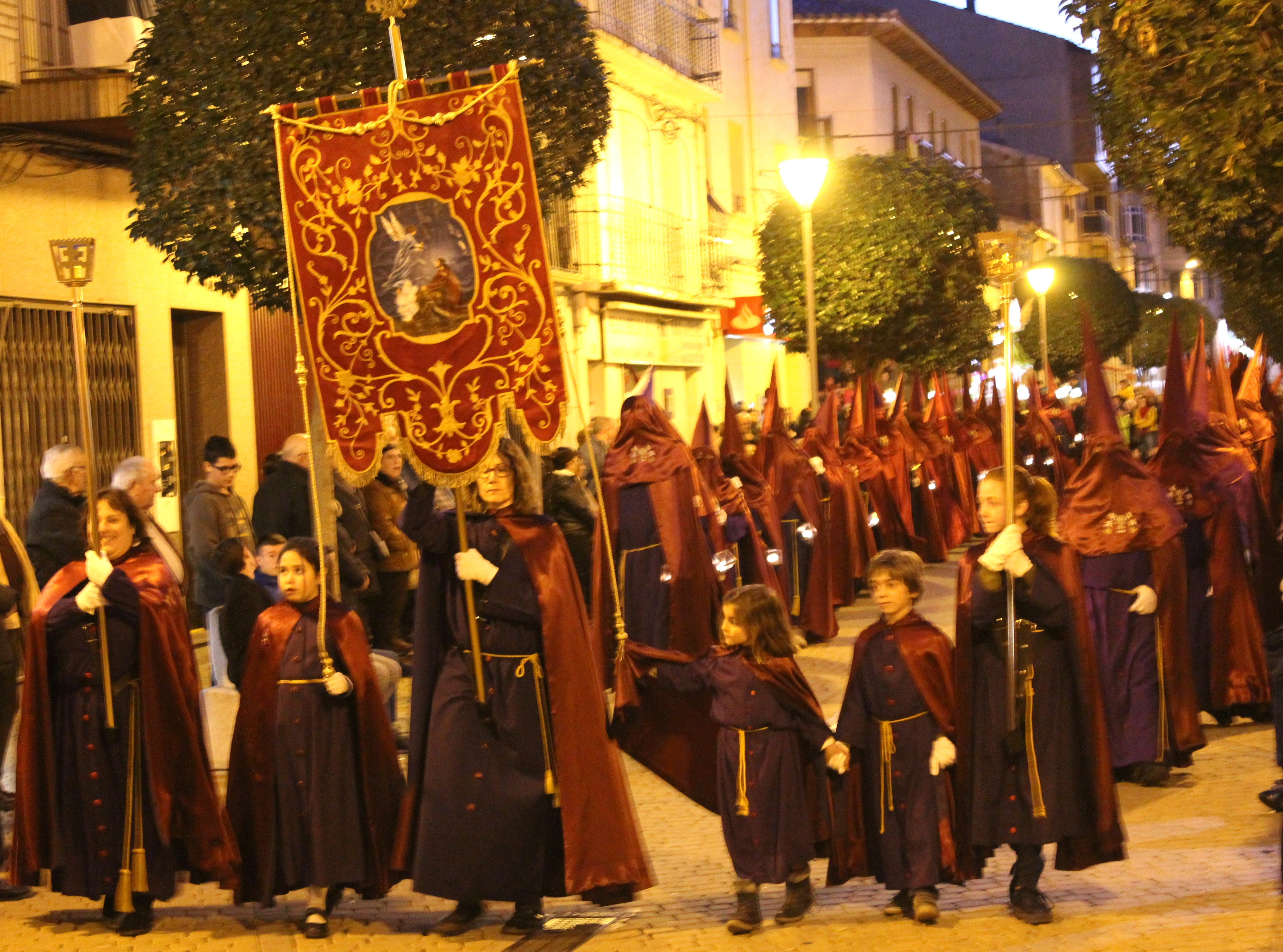 Imagen de la Cofradía de la Oración del Huerto de Andorra durante la Procesión del Silencio del Jueves Santo. En primer término se aprecia el estandarte.